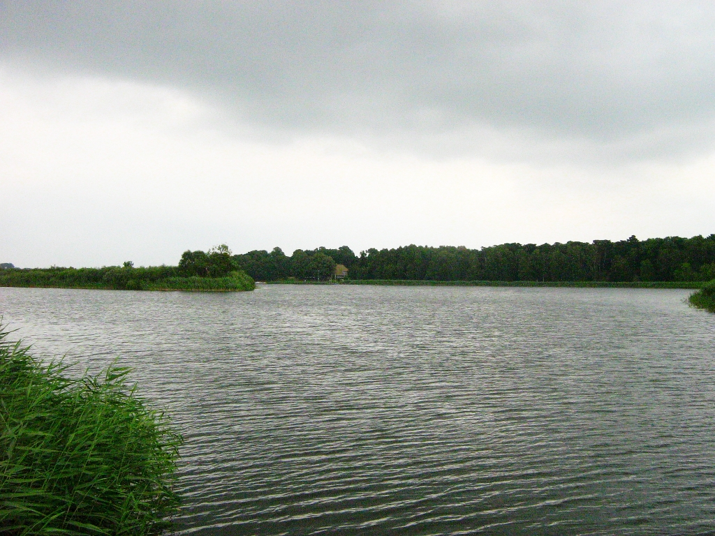 Blick von der Fährstelle auf der Halbinsel Sauerwerder auf den Teterower See. Das Land rechts im Bild ist die Burgwallinsel. Die Landzunge halblinks ist der Schnakenlang. (Landkreis Güstrow, Mecklenburg).